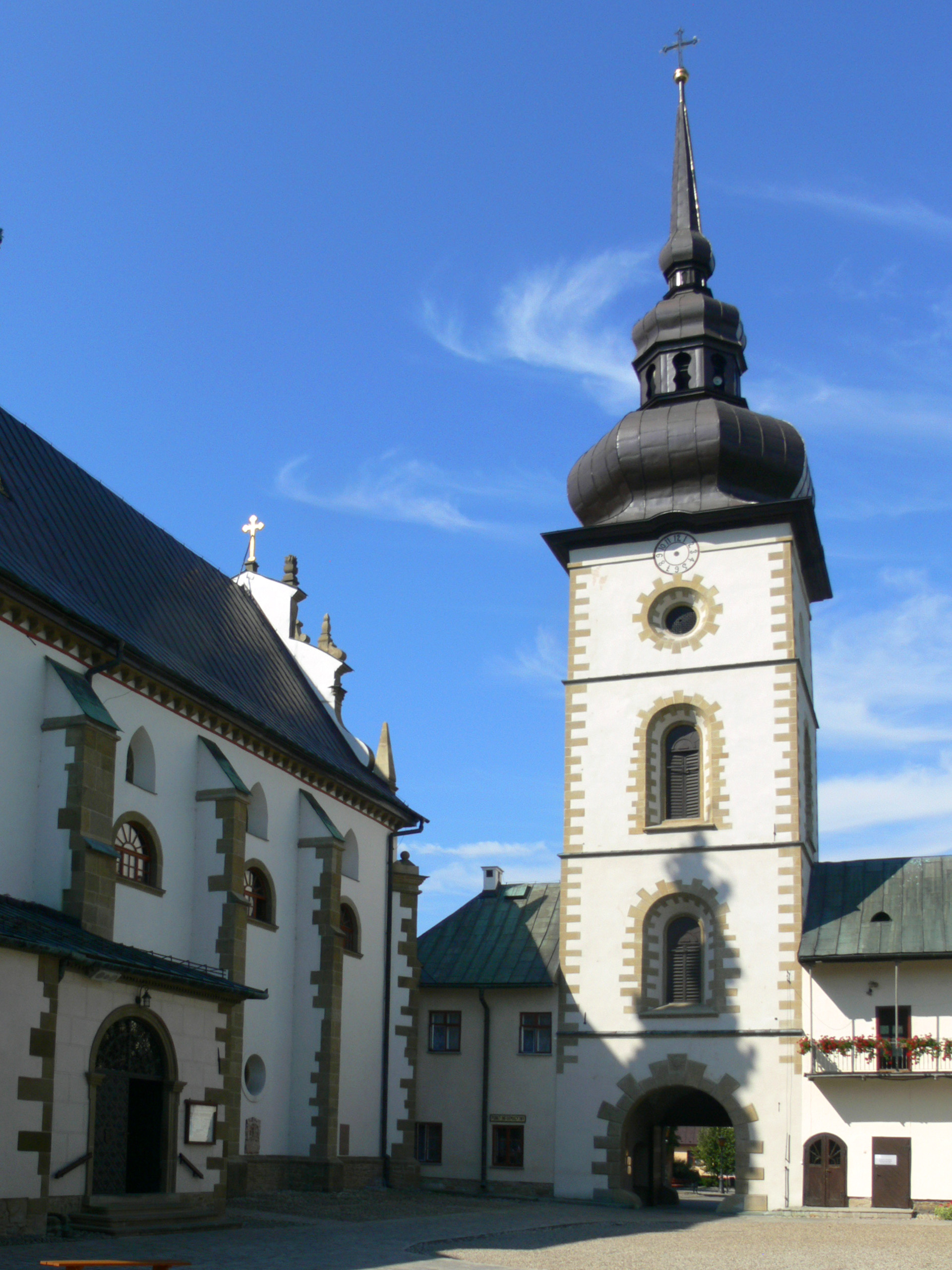 Stary Sącz, zespół klasztorny klarysek, XIV, XVI, XVIII